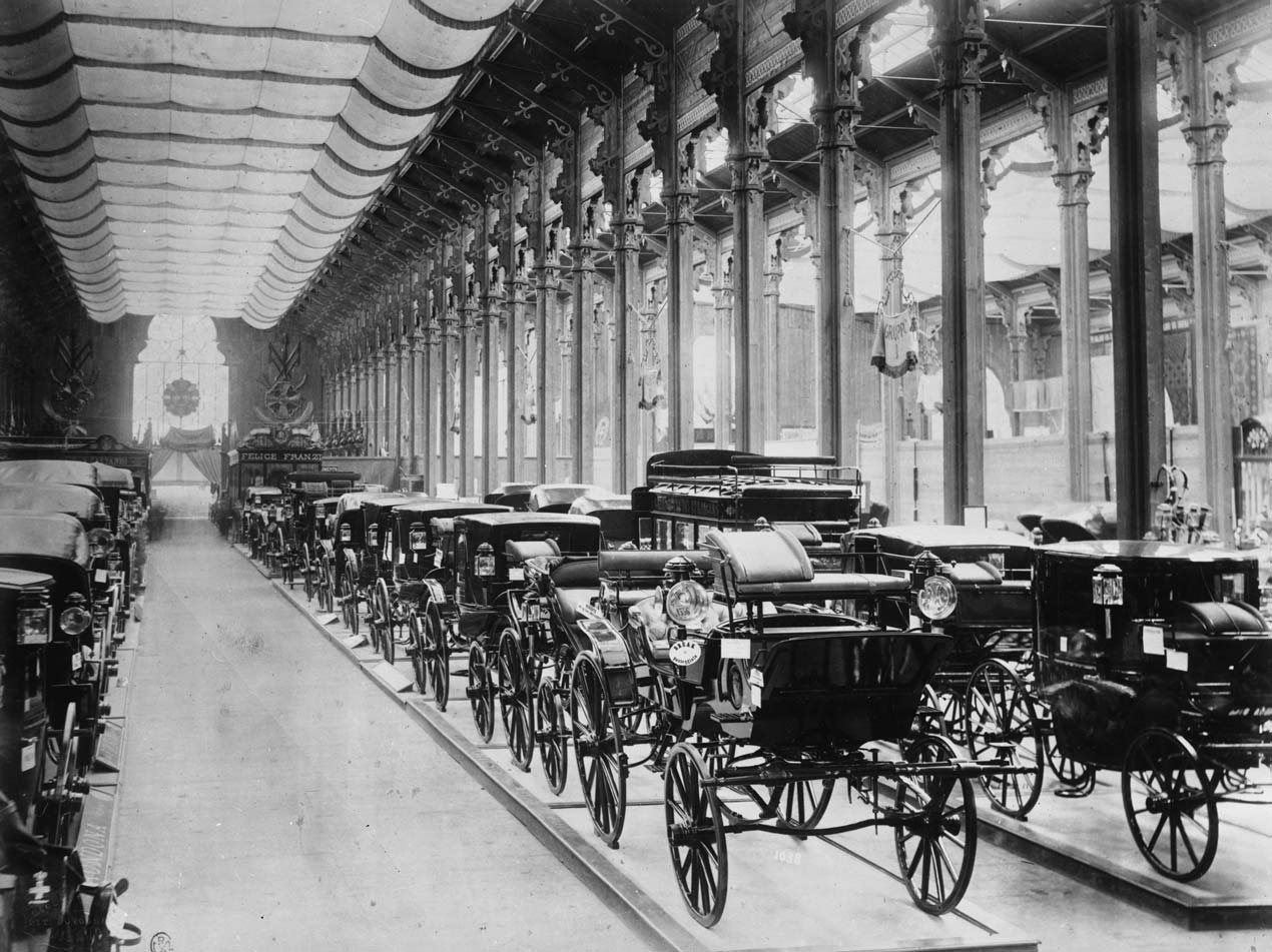 Fotografia anonima scattata nel 1881 presso l'Esposizione Nazionale di Milano, salone Carrozzerie e Selleria: in fondo è visibile lo spazio dell'azienda Felice Franzi, a sinistra lo spazio delle carrozze di Felice Grondona.